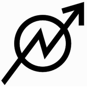 Simbolo dei movimenti autorganizzati